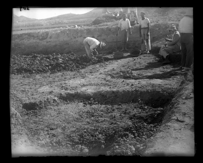 Detall de l'excavació d'Ereta del Pedregal (Navarrés) amb isidre Ballester assegut a la dreta. Circa 1944 [ Arxiu Negatius - 509]